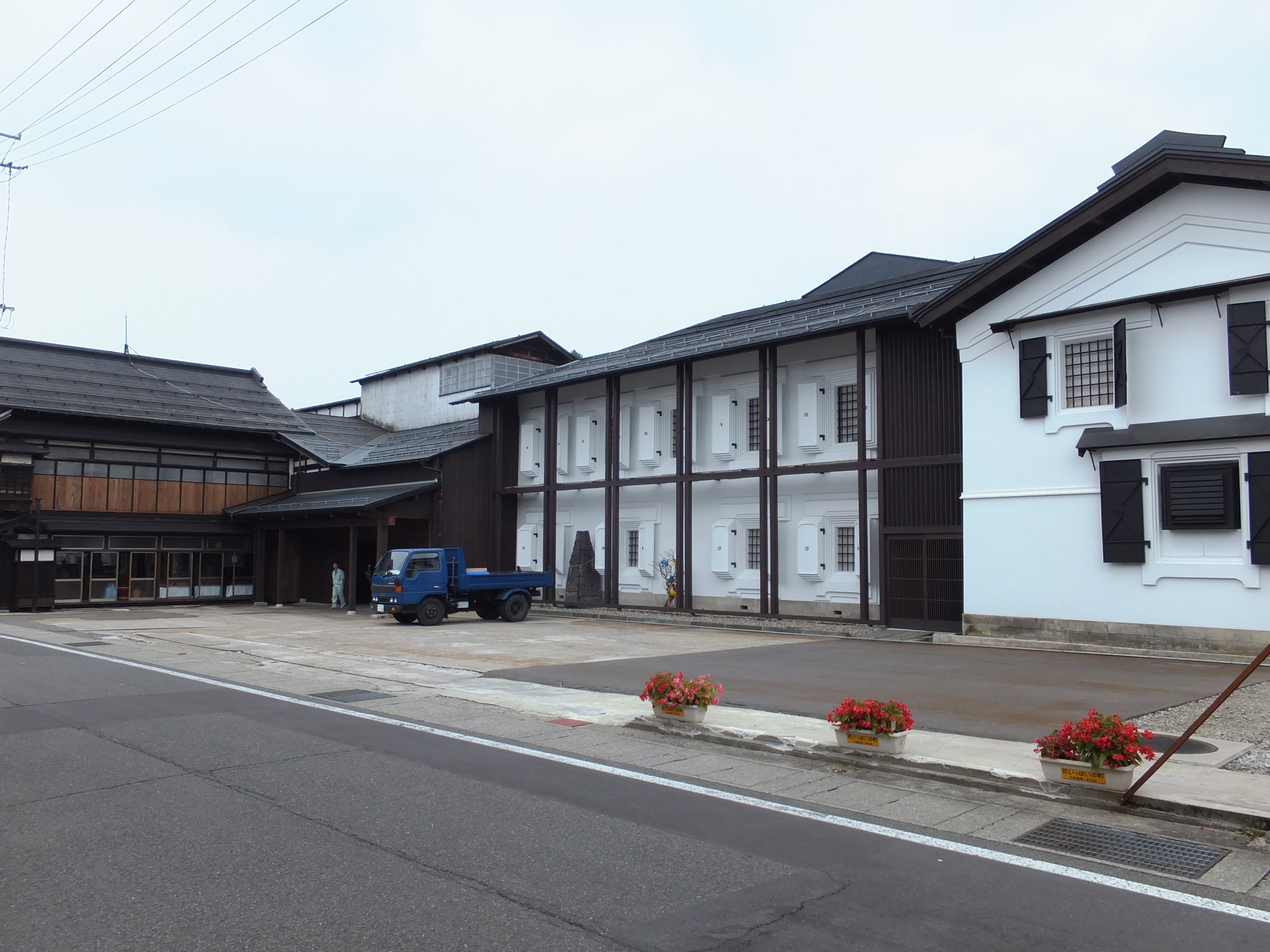 両関酒造・本社工場